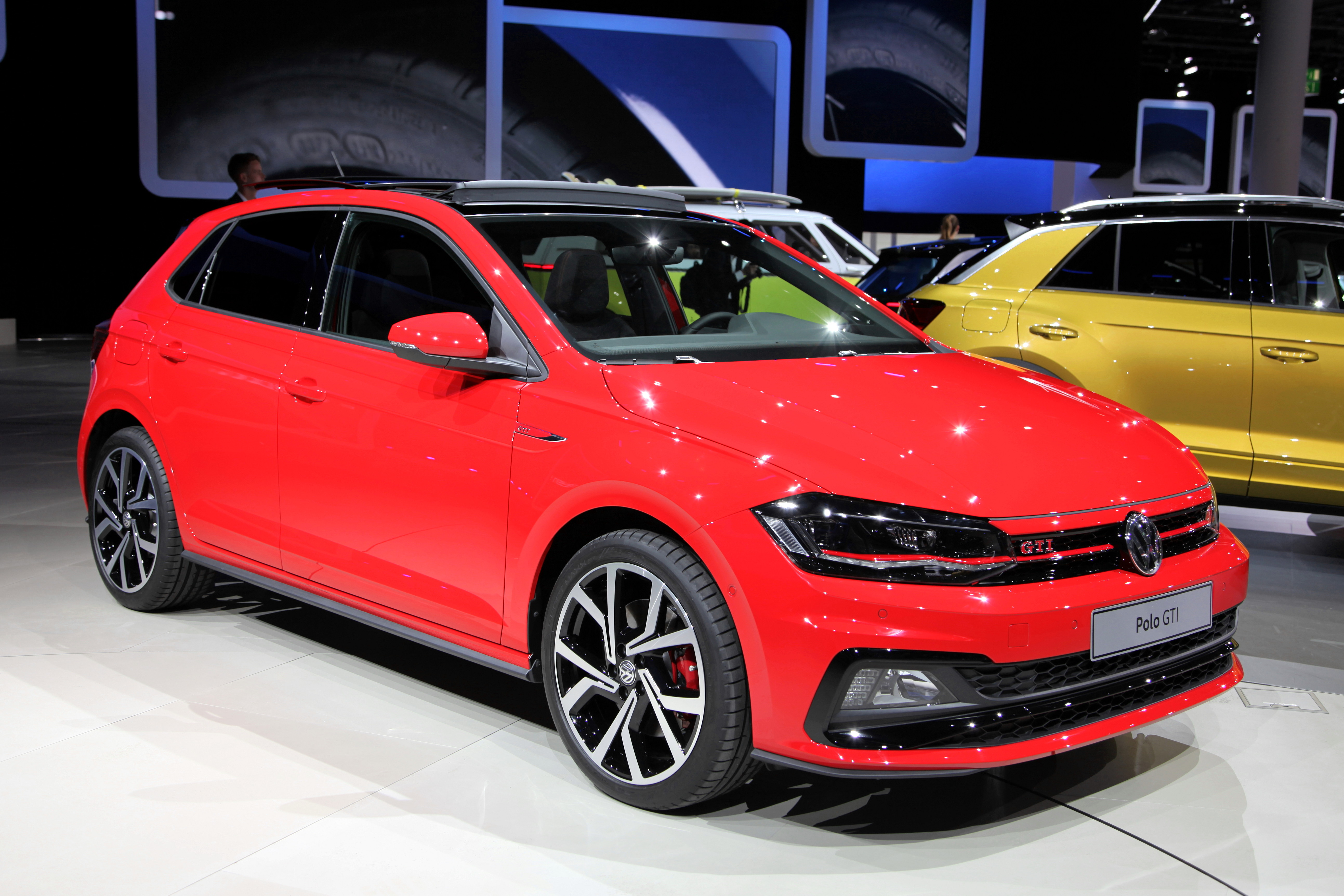 VW Polo GTI